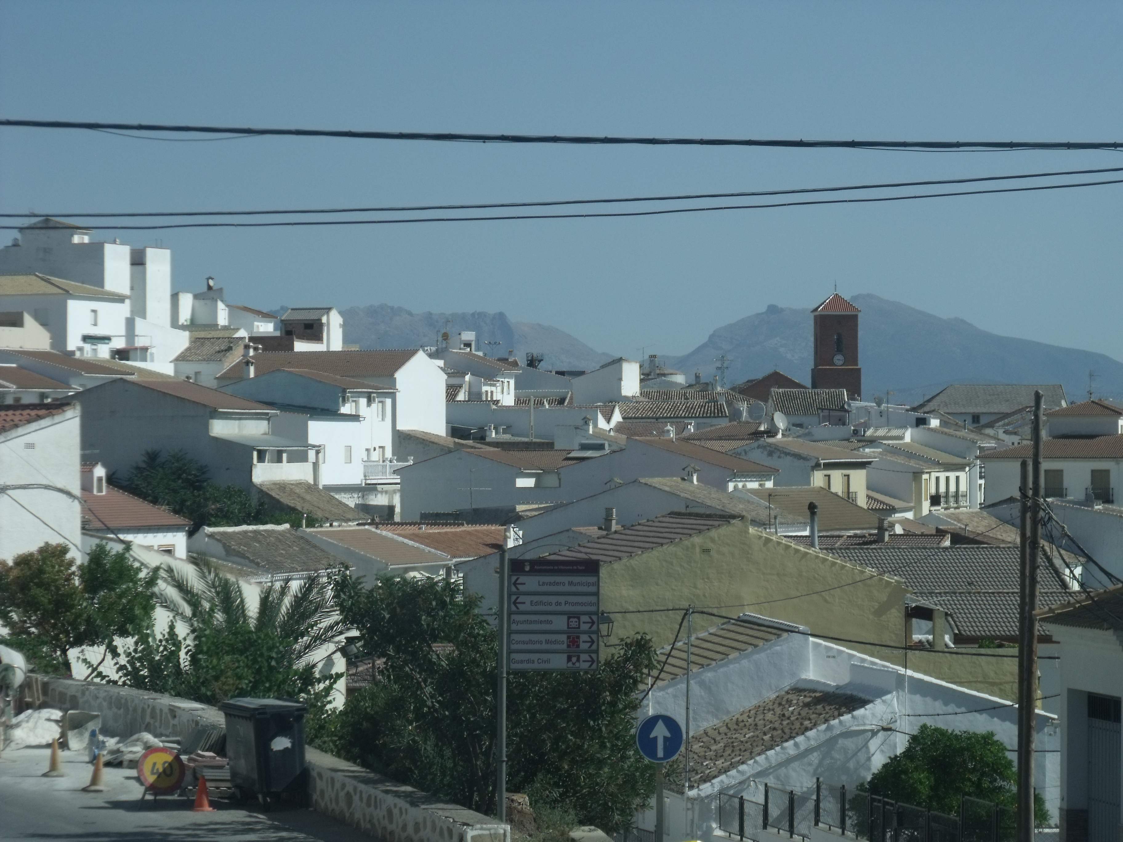 Vista general del pueblo